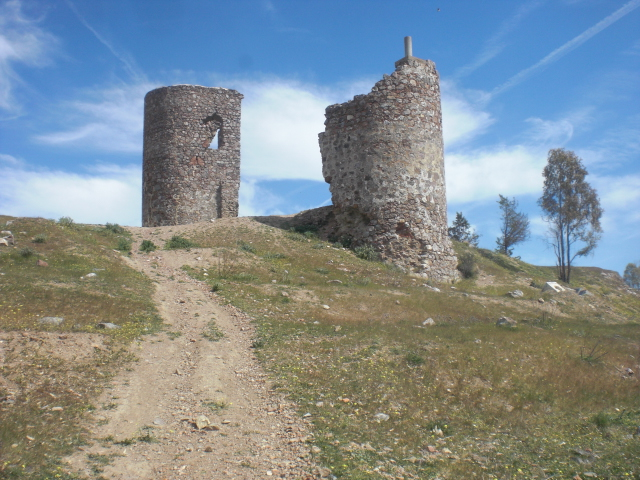 Ruinoj de la kastelo de Azuaga